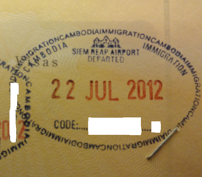 柬埔寨离境盖章